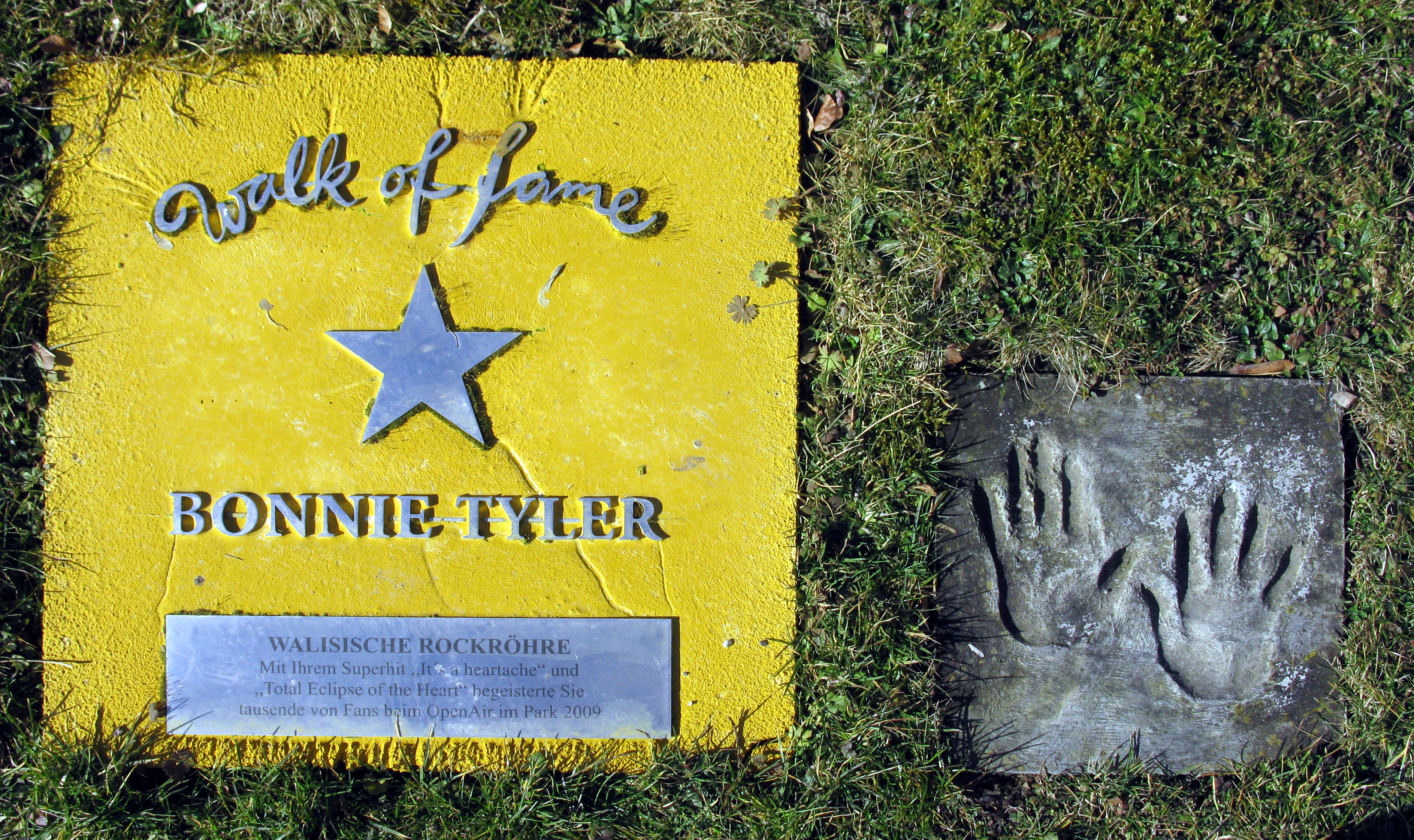 Bonnie Tyler auf dem Walk of fame im Kurpark von Bad Krozingen